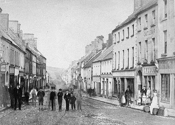 NLI Ref.: WYN2